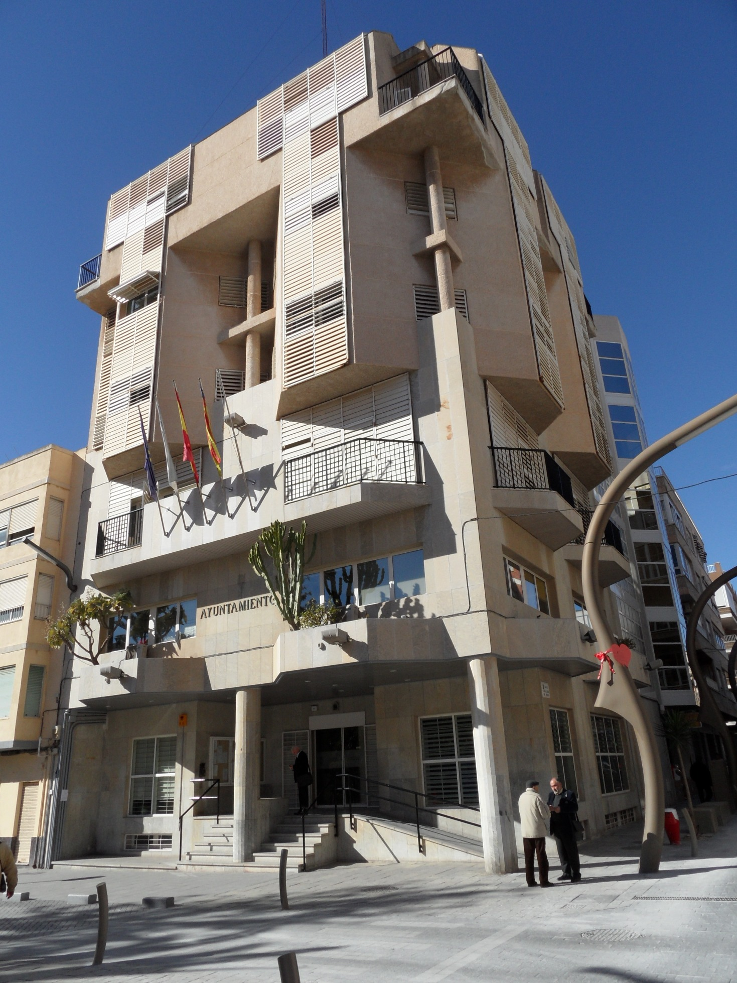 Ayuntamiento de Torrevieja.